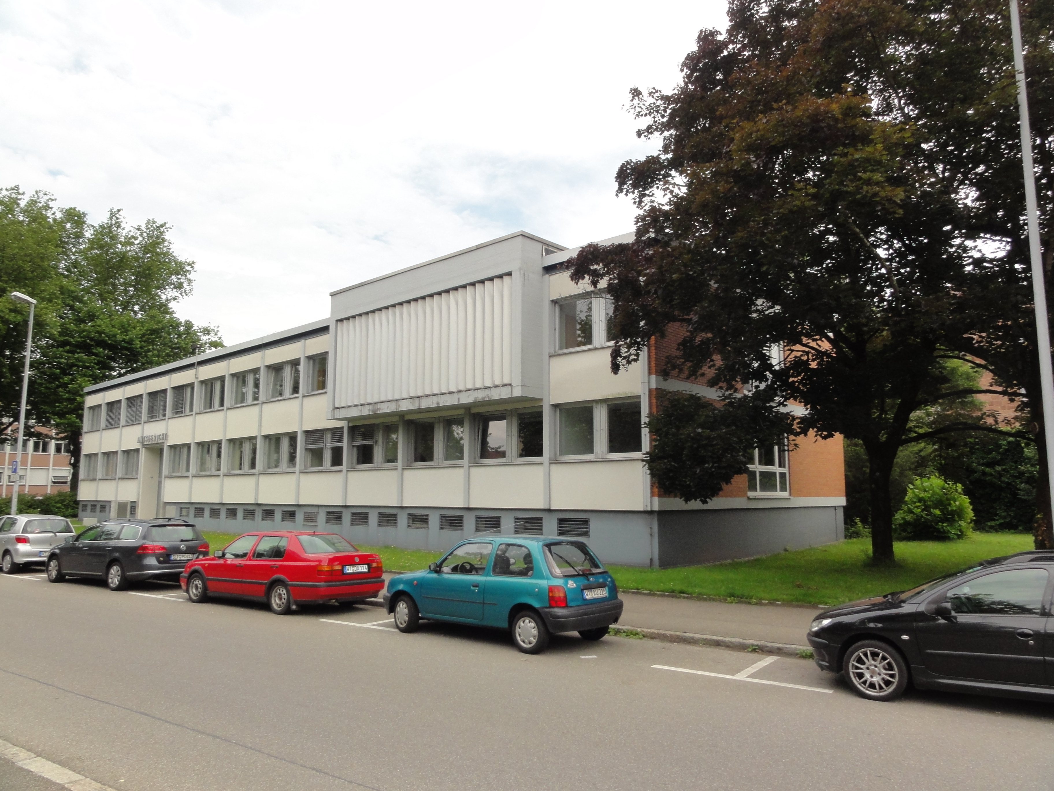 Bad Säckingen - Amtsgericht, Außenansicht Info GPS data may be inaccurate. EXIF data regarding date and time may be inaccurate.